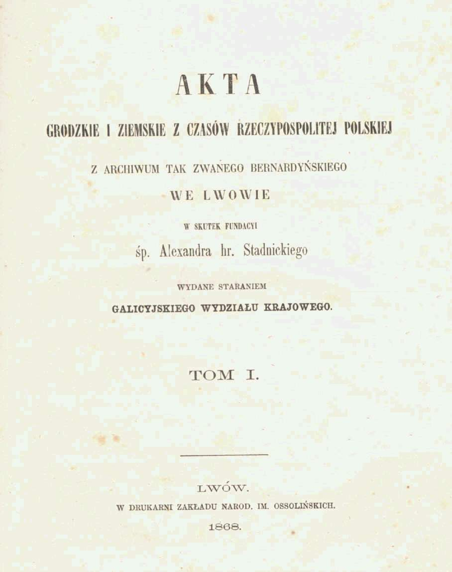 Pierwsza strona z I tomu Akt Grodzkich i Ziemskich z roku 1868, fundacji hr. Drohojowskiego